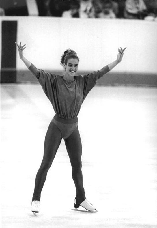 Kati Witt ADN-ZB Oberst 2.8.88 Berlin: ISU-Schaulauftournee Vor 3.000 begeisterten Zuschauern stellte sich in der Dynamo-Eishalle die mehrfache Olympiasiegerin, Welt- und Europameisterin Katarina Witt erneut vor und zeigte Proben ihres herausragenden Könnens. Abgebildete Personen: Witt, Katarina: Eiskunstläuferin, SC Karl-Marx-Stadt, Olympiade 1984 und 1988, DDR (GND 11884508X)